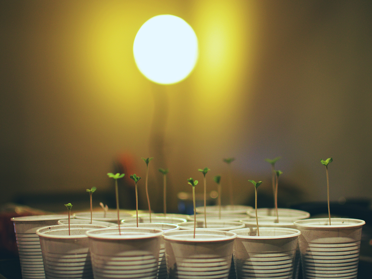 Plantas de marihuana